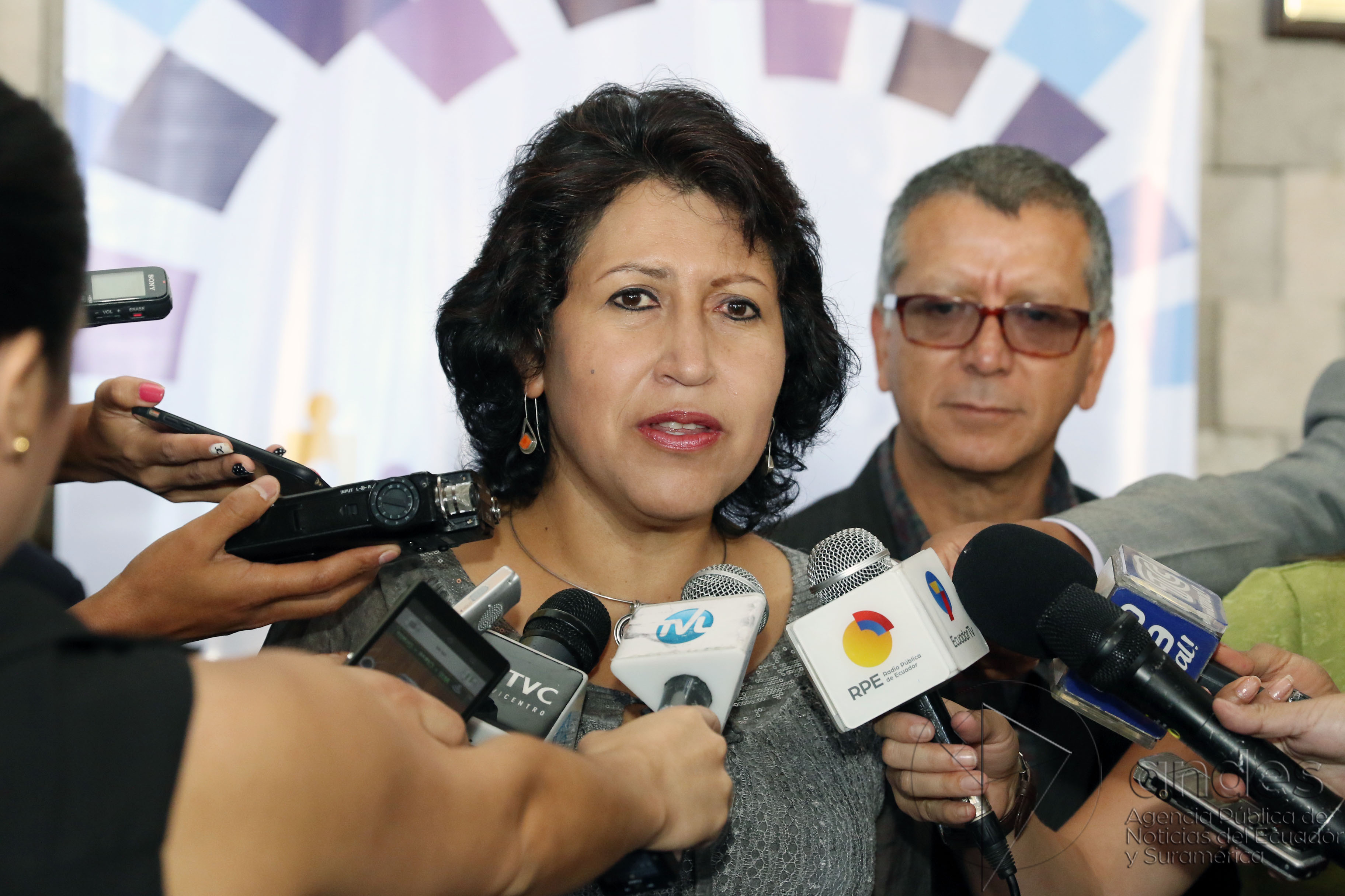 La Ministra de Inclusión Económica y Social Betty Tola, en alianza con el gobierno provincial de Pichincha, firmó convenios interinstitucionales que beneficiarán a 23.383 grupos de atención prioritaria. ANDES/Micaela Ayala V.